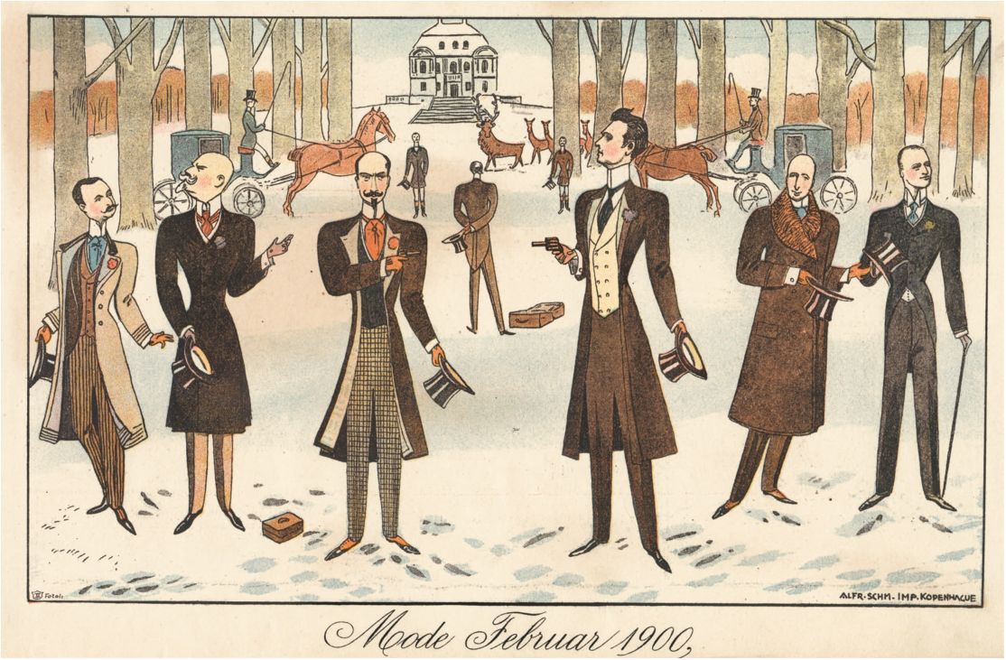 Karikatur des Duells zwischen Robert Schyberg und Edvald Brandes im Jahre 1900. Zeichner: Alfred Schmidt (1858-1938). 1900 beteiligte sich Edvard Brandes an dem wahrscheinlich letzten Duell, das in Dänemark ausgetragen werden. Der Schauspieler Robert Schyberg ohrfeigte ihn auf der Straße für eine abfällige Bemerkung in einer Theaterkritik, woraufhin Brandes ihn zu einem Duell herausforderte. Das Duell fand in Ermelunden statt, aber Alfred Schmidt hat auf seiner Zeichnung die Duellanten vor dem malerischen Eremitageslottet platziert. V.l.n.r.: Peter Nansen, Erik Skram, Edvard Brandes, Robert Schyberg, Karl Mantzius, Poul Nielsen. Die Zeichnung erschien in der Zeitschrift Blæksprutten (Krake).